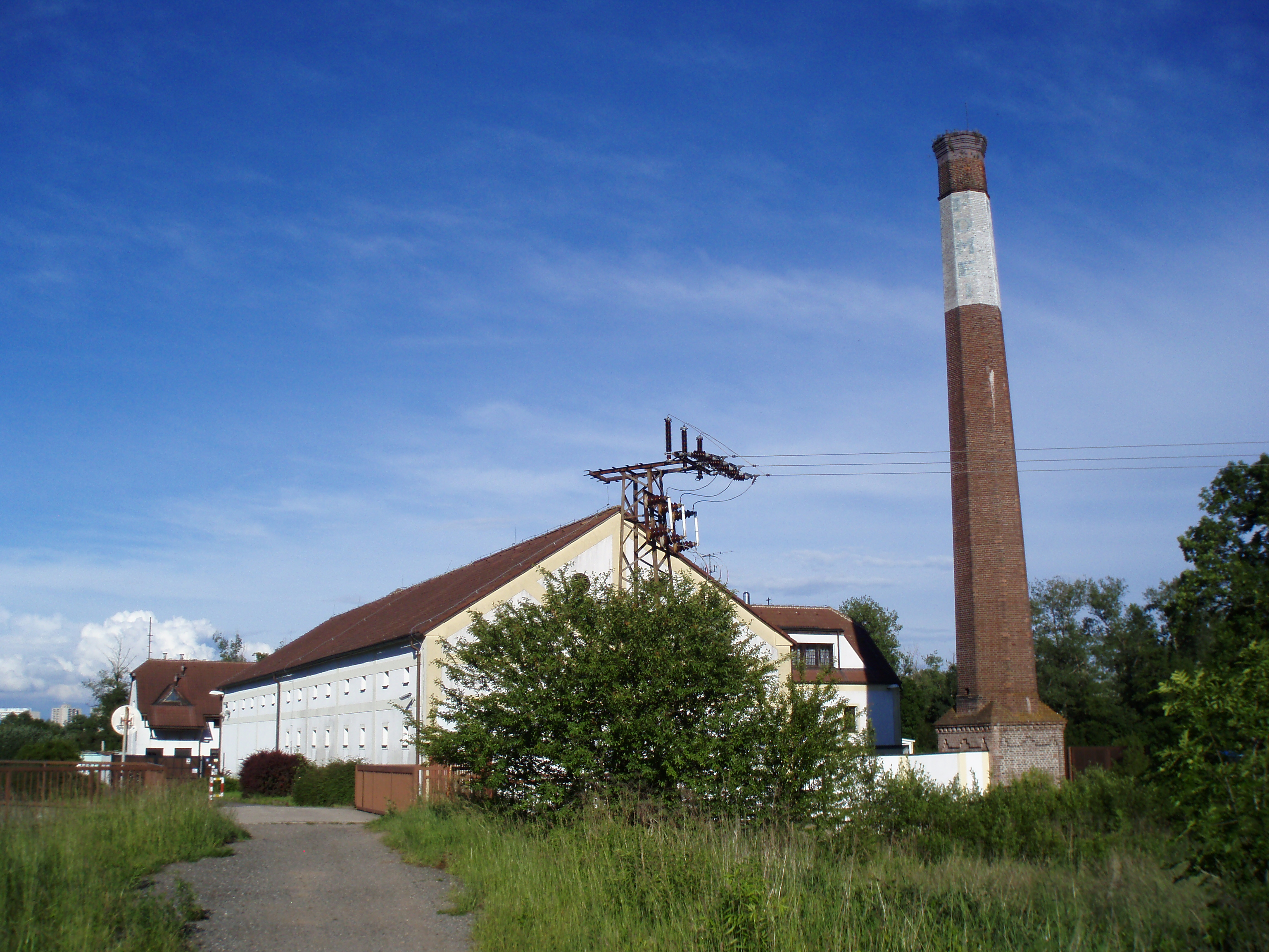 Bývalý Temešvárský mlýn